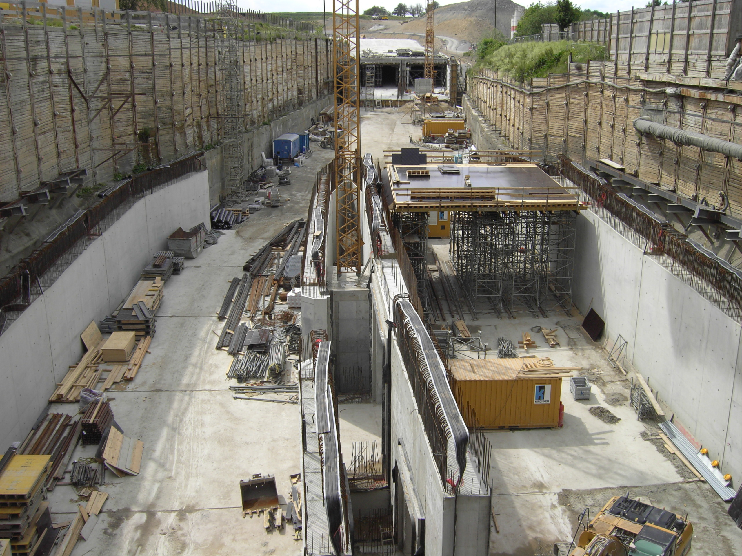 Tunnel Leutenbach: Im Anschluss an die bergmännische Bauweise wird die Betonschale für das Teilstück in offener Bauweise hergestellt.